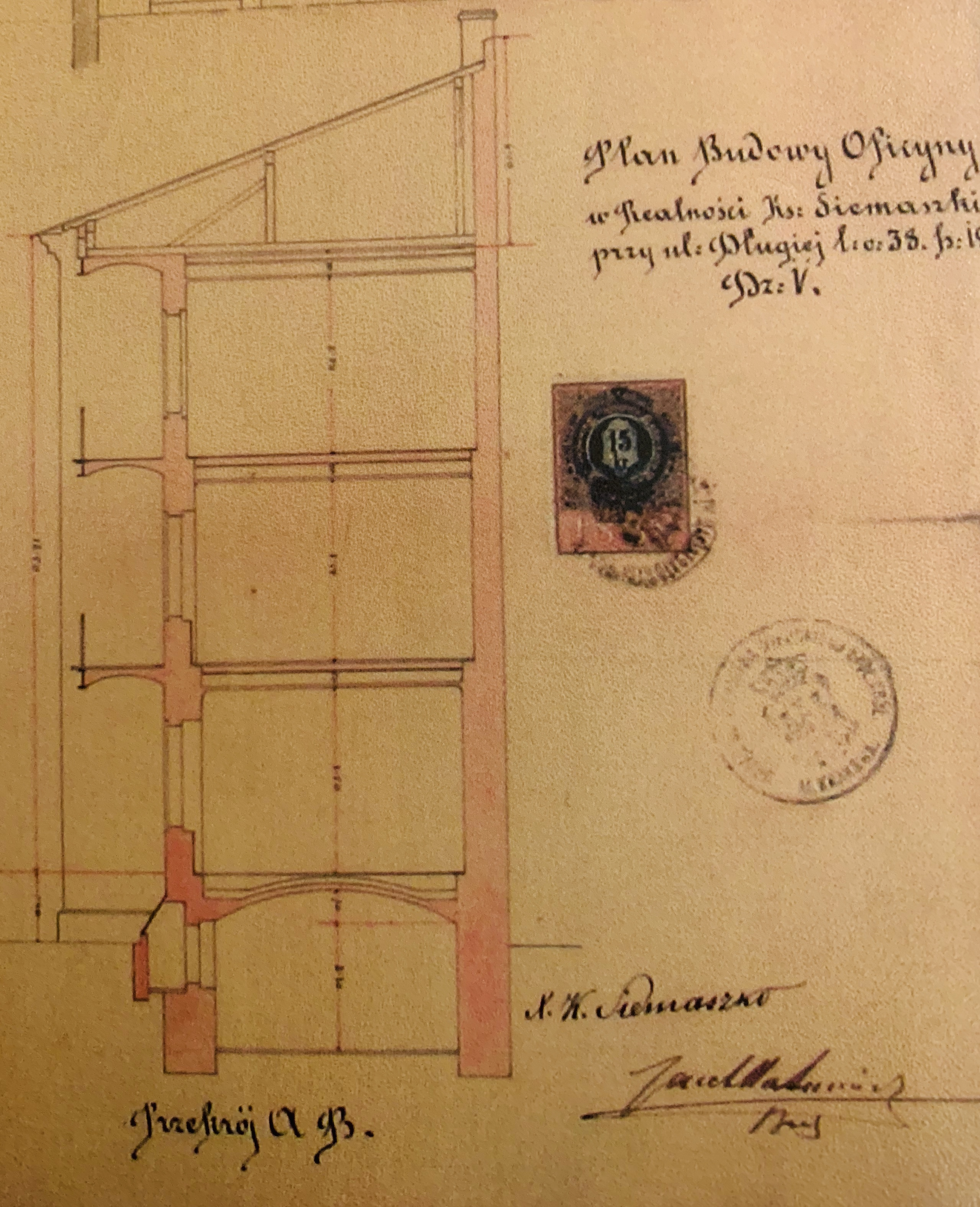 Plany budowy oficyny w Domu Schronienia i Dobrowolnej Pracy dla biednych opuszczonych chłopców w Krakowie.